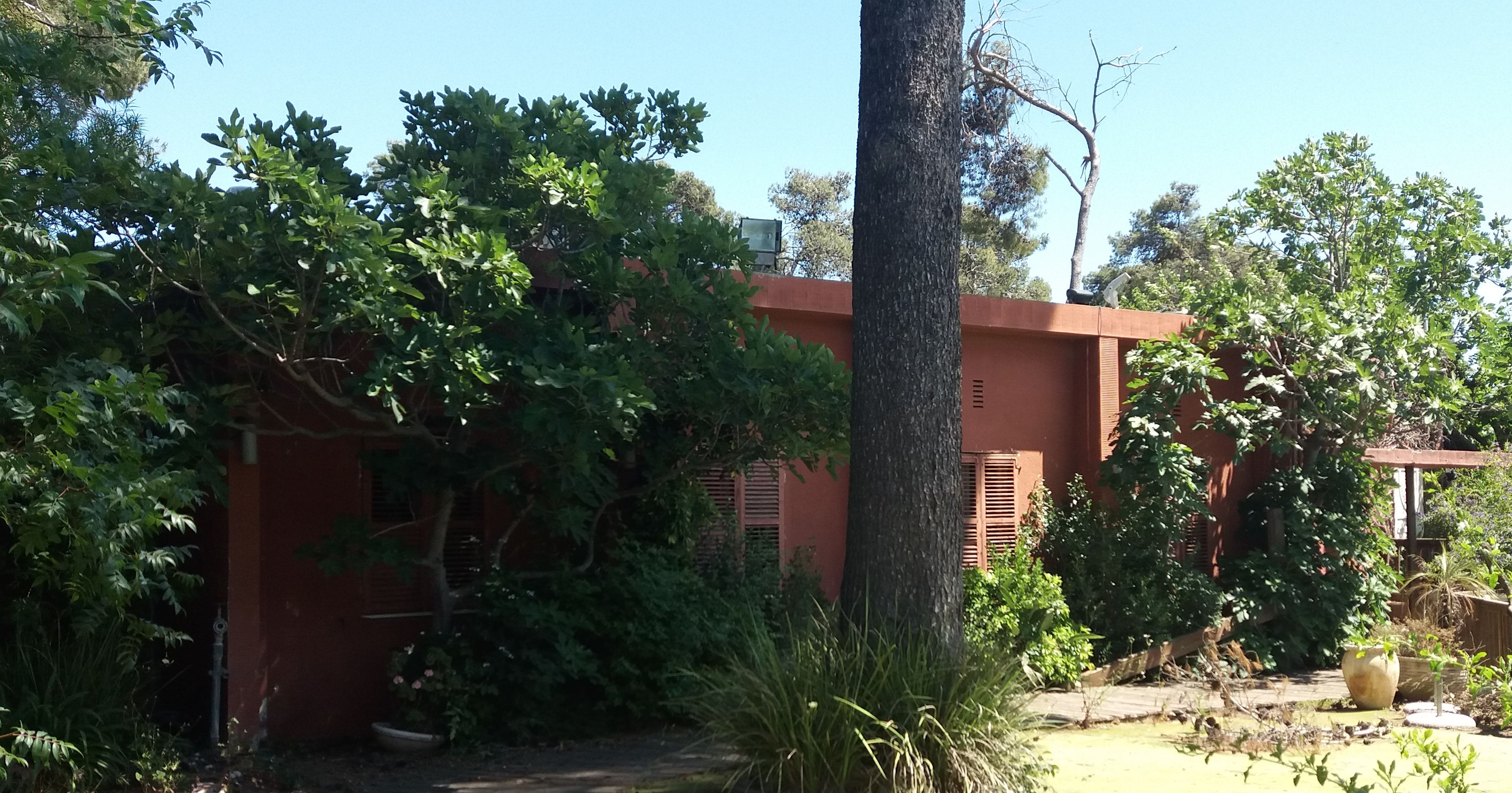 Der Bejt Aguddat ha-Schomrim (בֵּית אֲגוּדַּת הַשּׁוֹמְרִים) in Bejt Saïd (בֵּית זַיִד), geplant und erbaut von Tibor Schön.